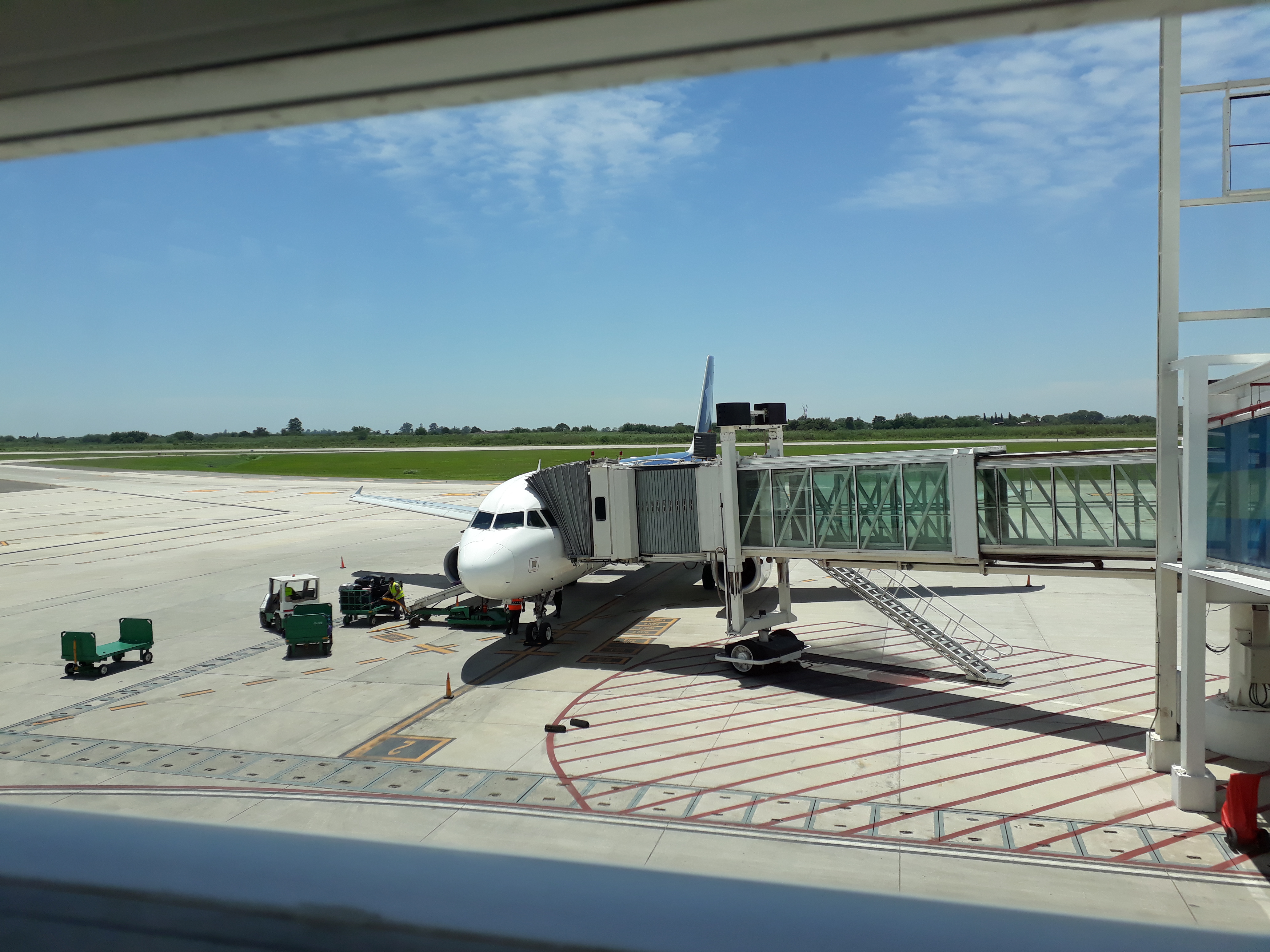 A320 de LATAM Chile próximo a partir a Santiago de Chile